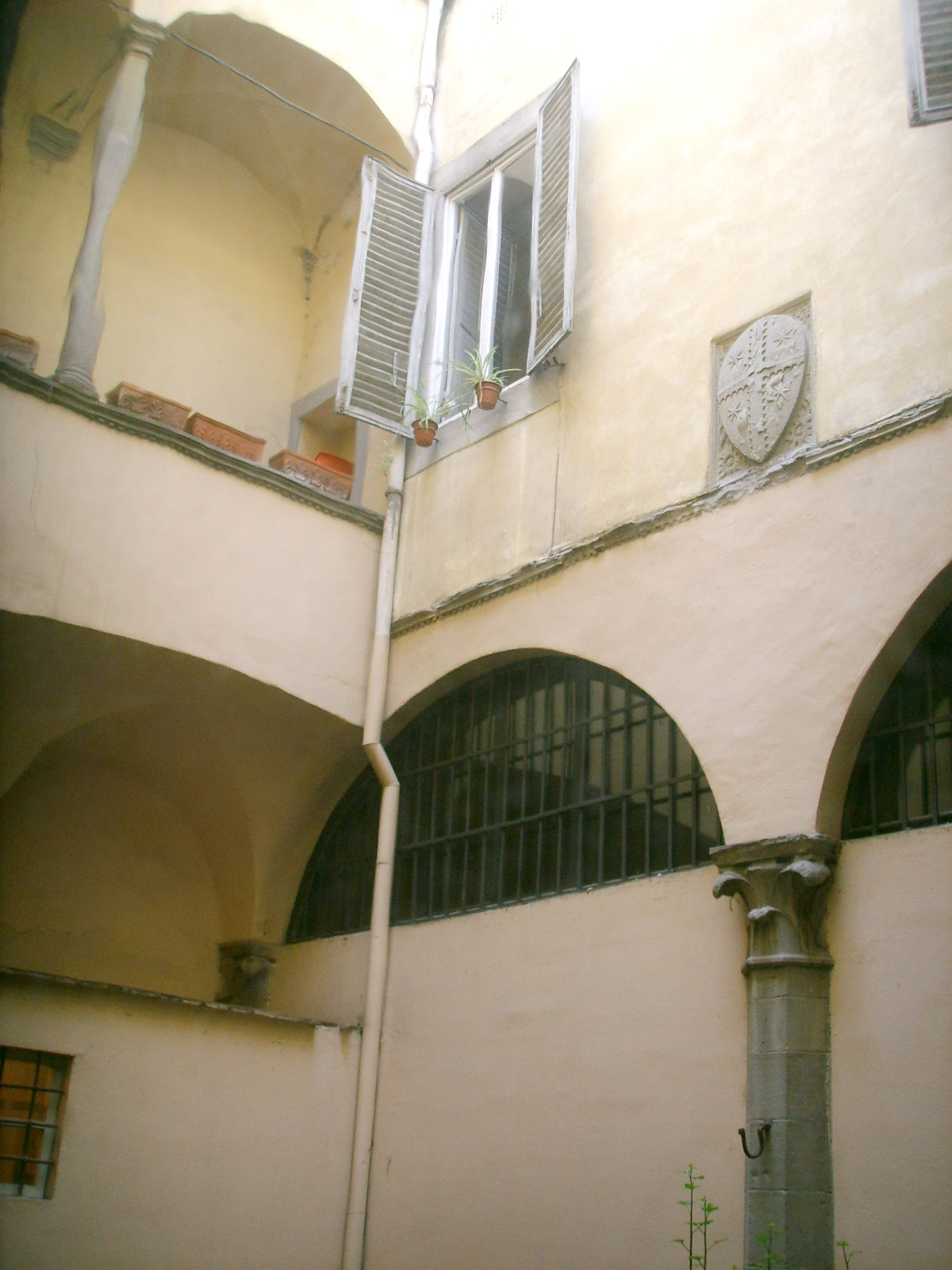 Palazzo gherardi cortile